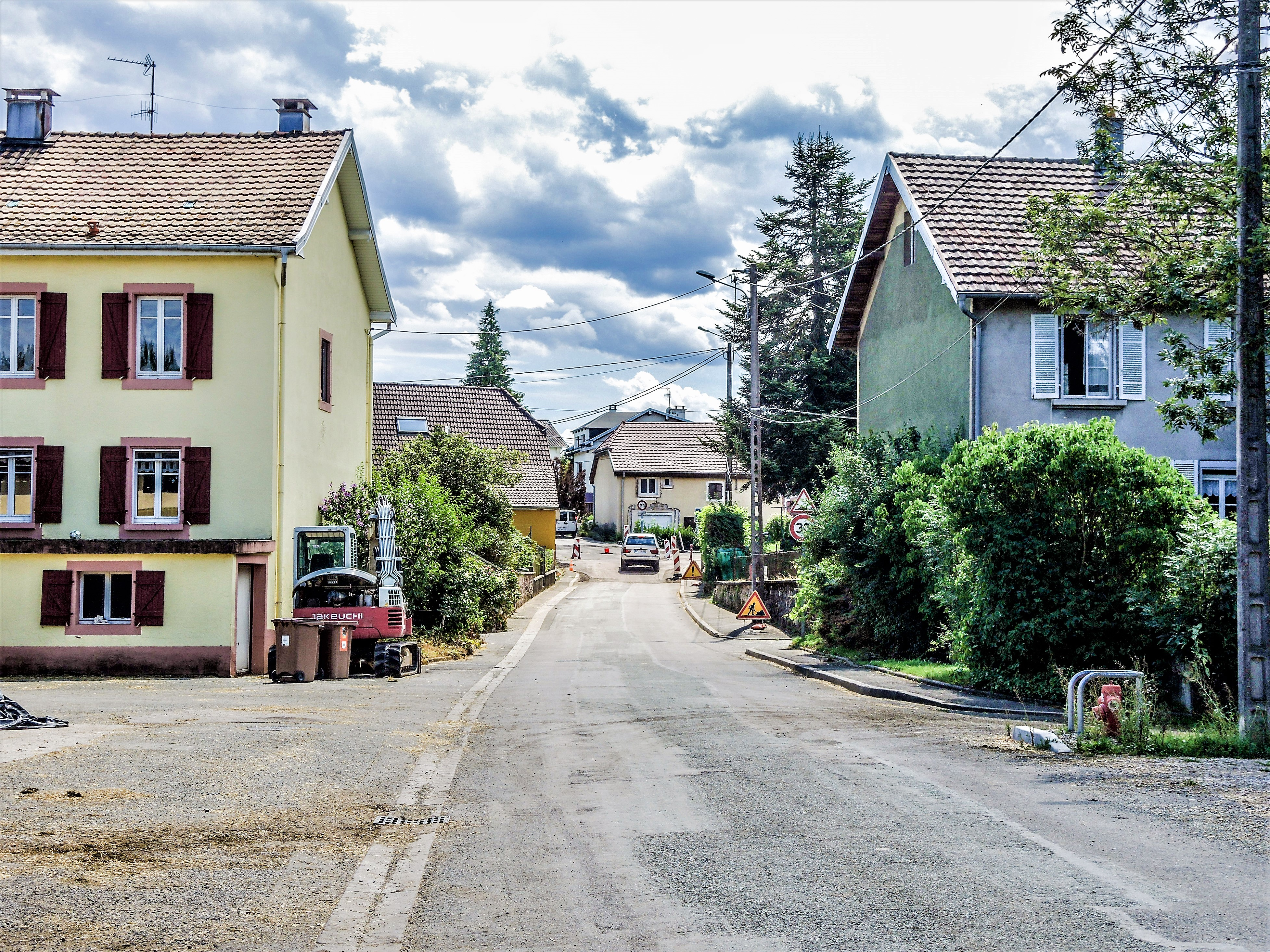 Grande rue du village